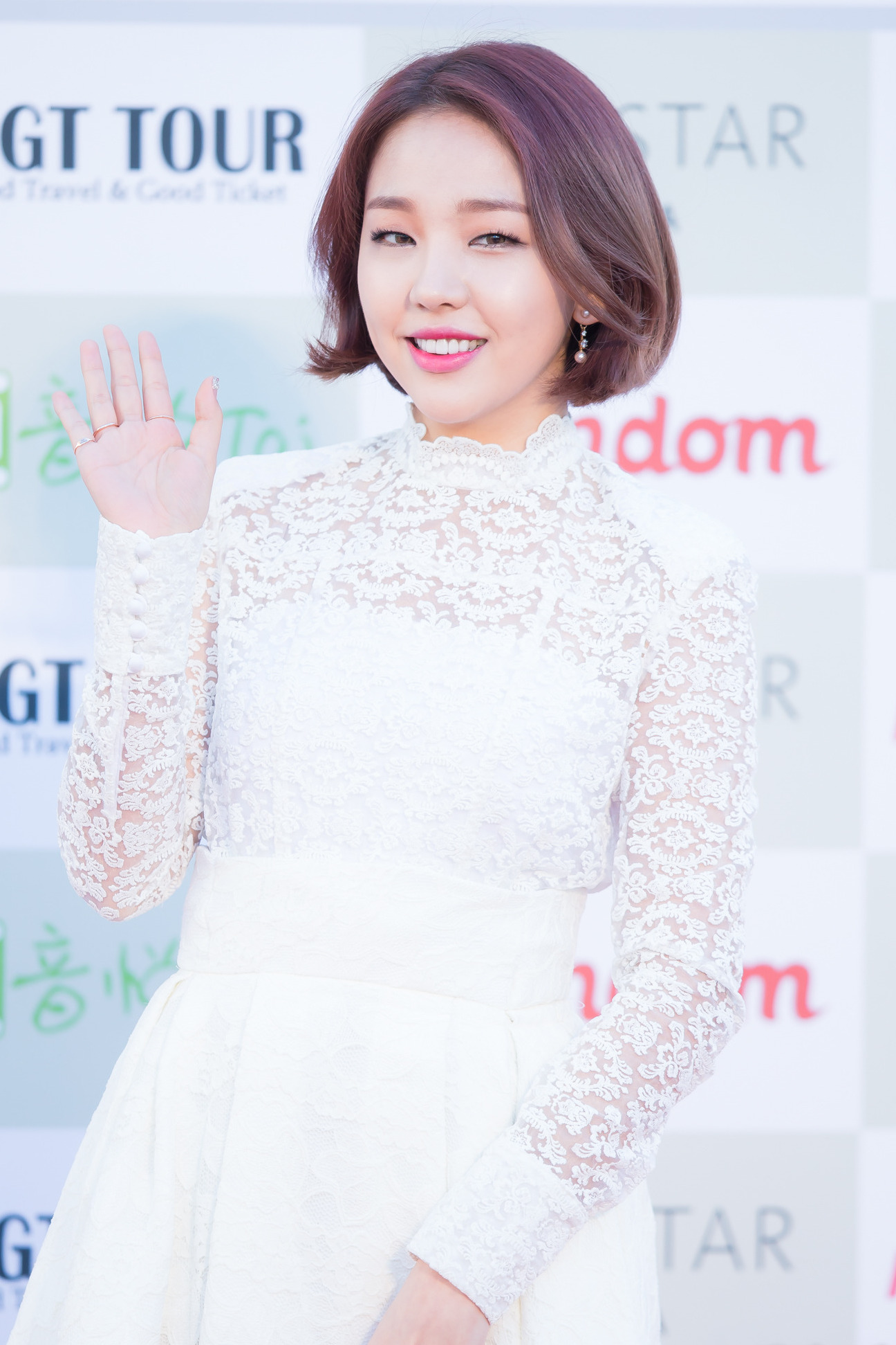 160217 가온차트 K-POP 어워드 레드카펫